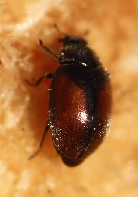 Gestreifter Kiefern-Zwergmarienkäfer (Scymnus suturalis) an der Schnittfläche eines gefällten Kiefernbaumstamms in der Schwetzinger Hardt am 25. Februar 2019